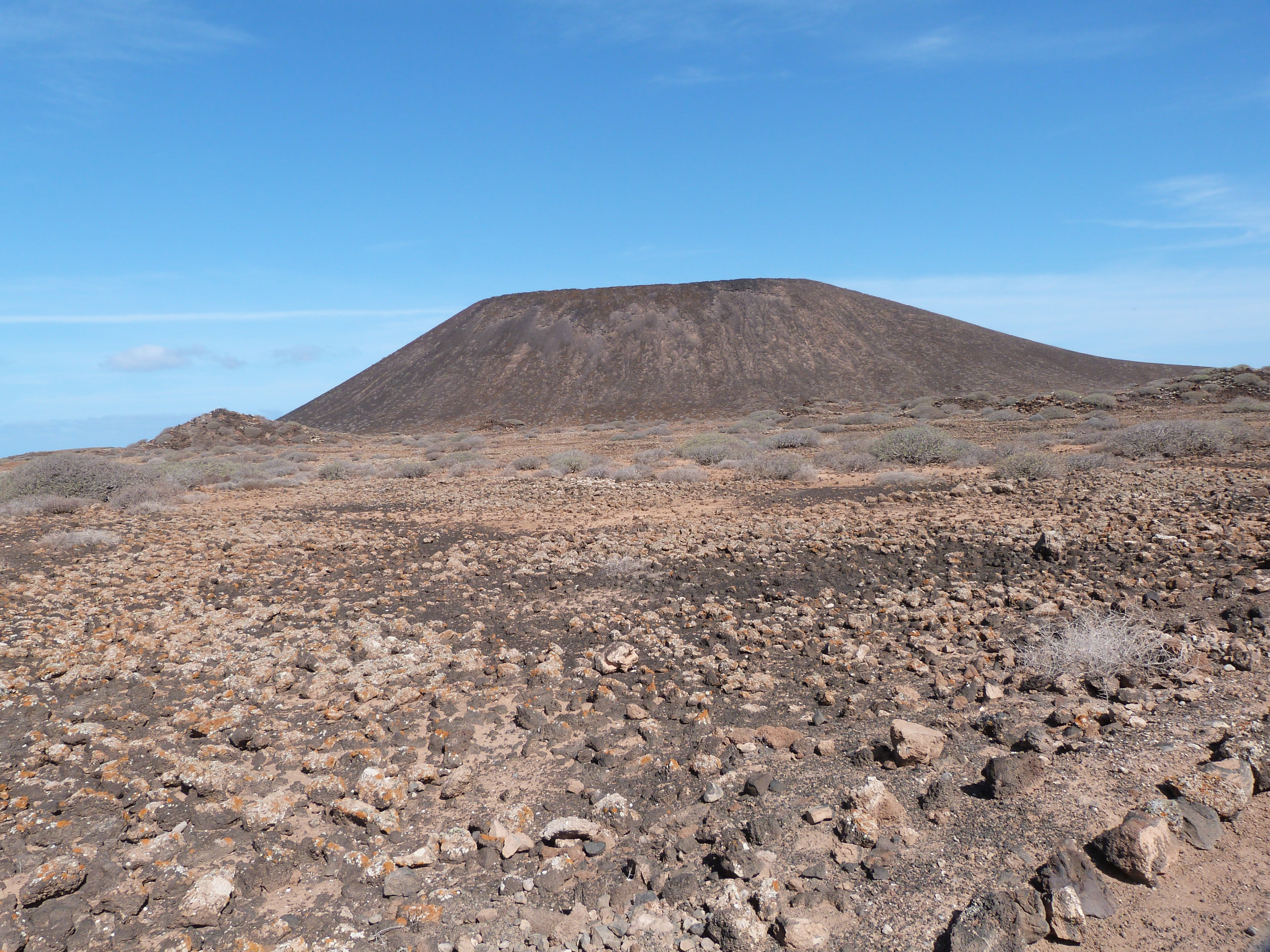 Ancien volcan, la Montana de la Caldera est le point culminant de l'île